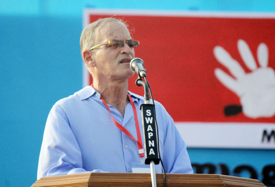 നോർമൻ ഫിങ്കൽസ്റ്റീൻ